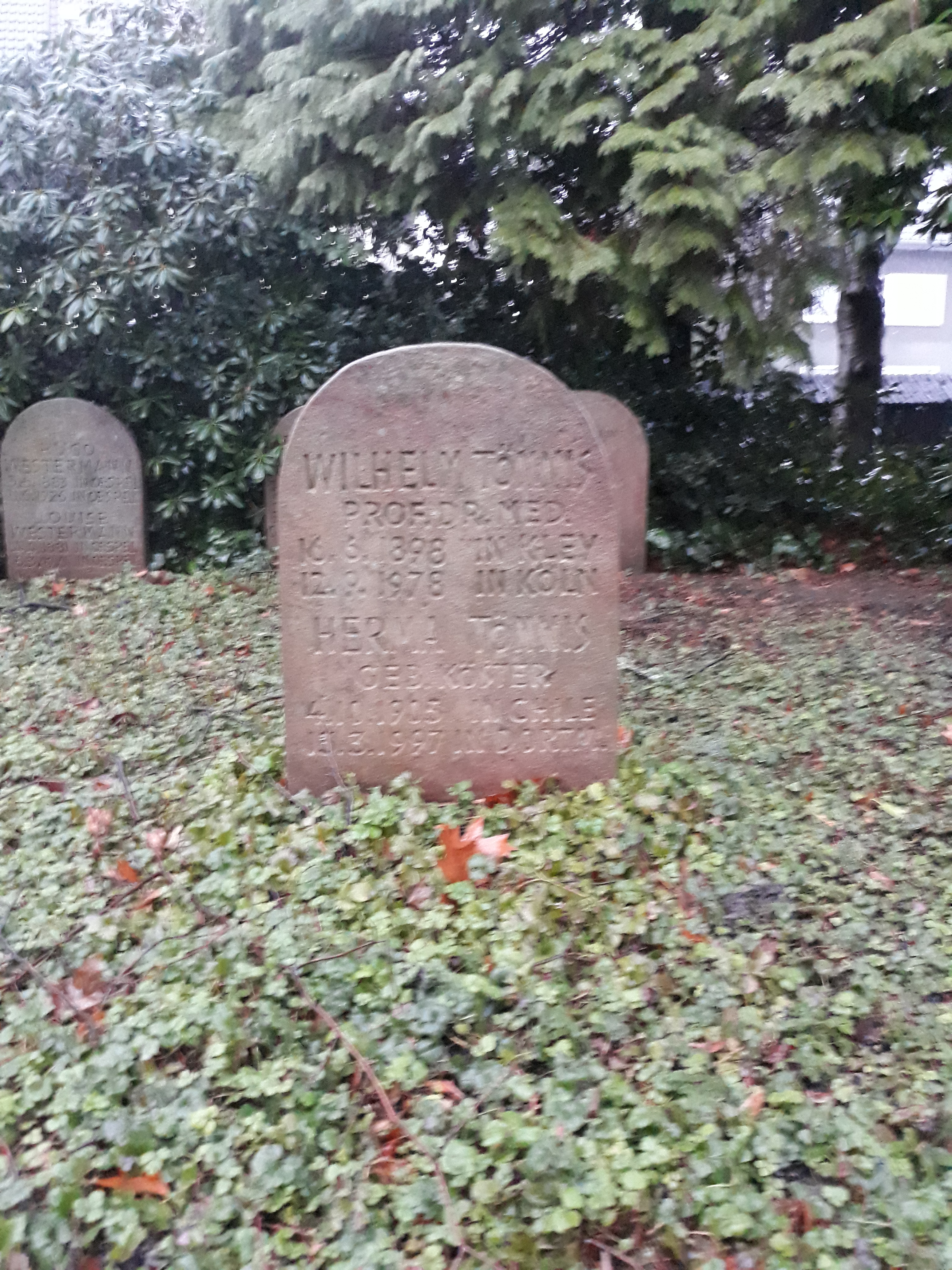 Das Grab des deutschen Neurochirurgen Wilhelm Tönnis im Familiengrab auf dem Friedhof Oespel in Dortmund.